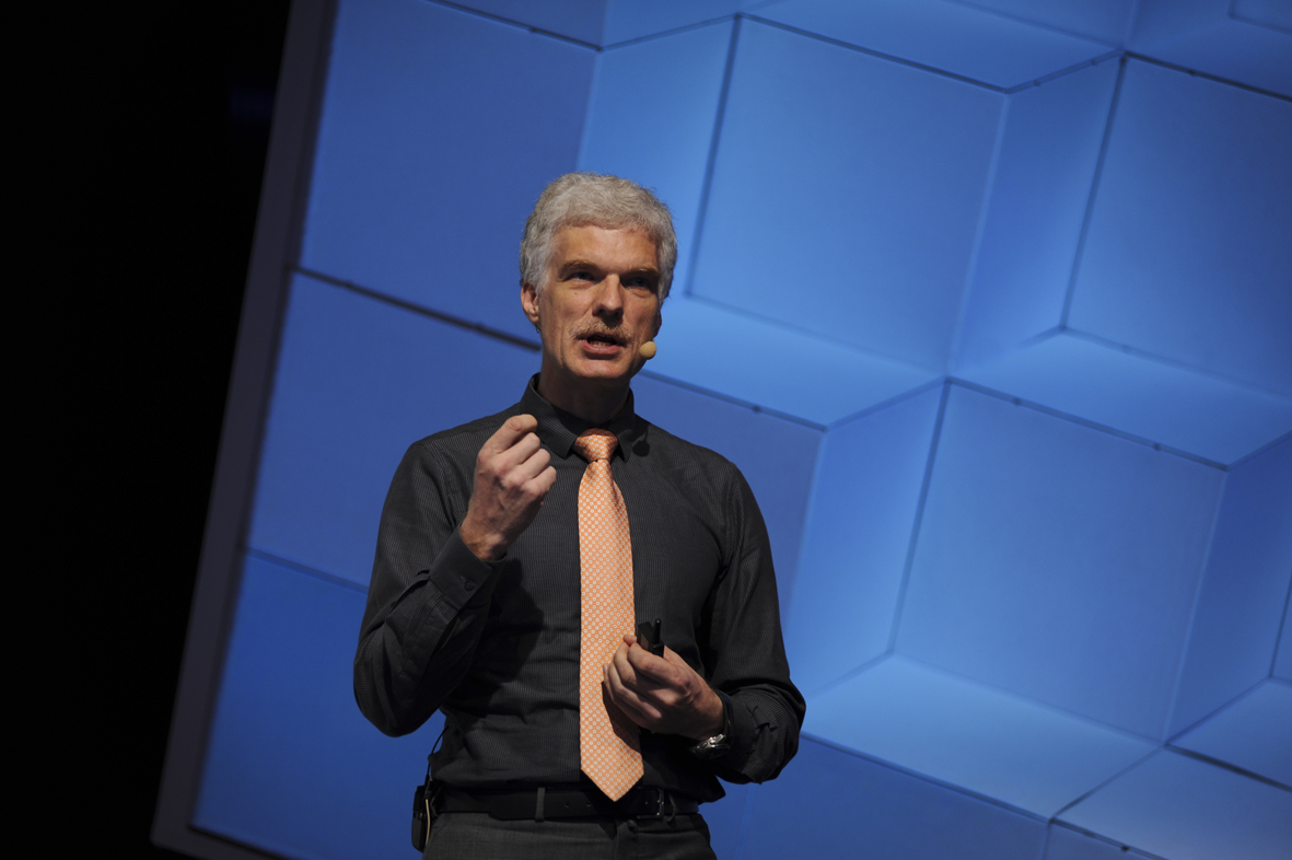 Andreas Schleicher 2013